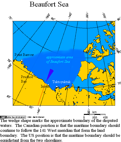 Área aproximada del Mar de Beaufort, y el área en disputa Beaufort Sea and the disputed waters The wedge shaped area on this map is the approximate area of the waters in dispute between the Yukon and Alaska. The longitude and latitudes of the communities follow: -148.4054,70.2254,Prudhoe Bay -156.7358,71.3003,Barrow -139.5011,69.5539,Inuvik -135.3302,69.6212,Tuktoyuktuk Secondary source: Image:Beaufort_Sea_and_disputed_waters.png Copyright owner: Geo Swan